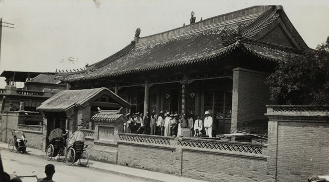 马大夫纪念医院旧影